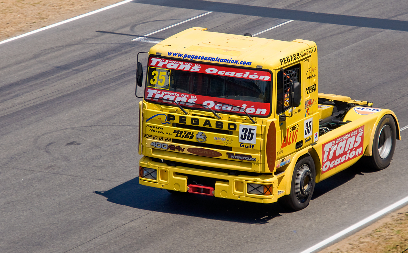 Cabeza tractora Pegaso en competición